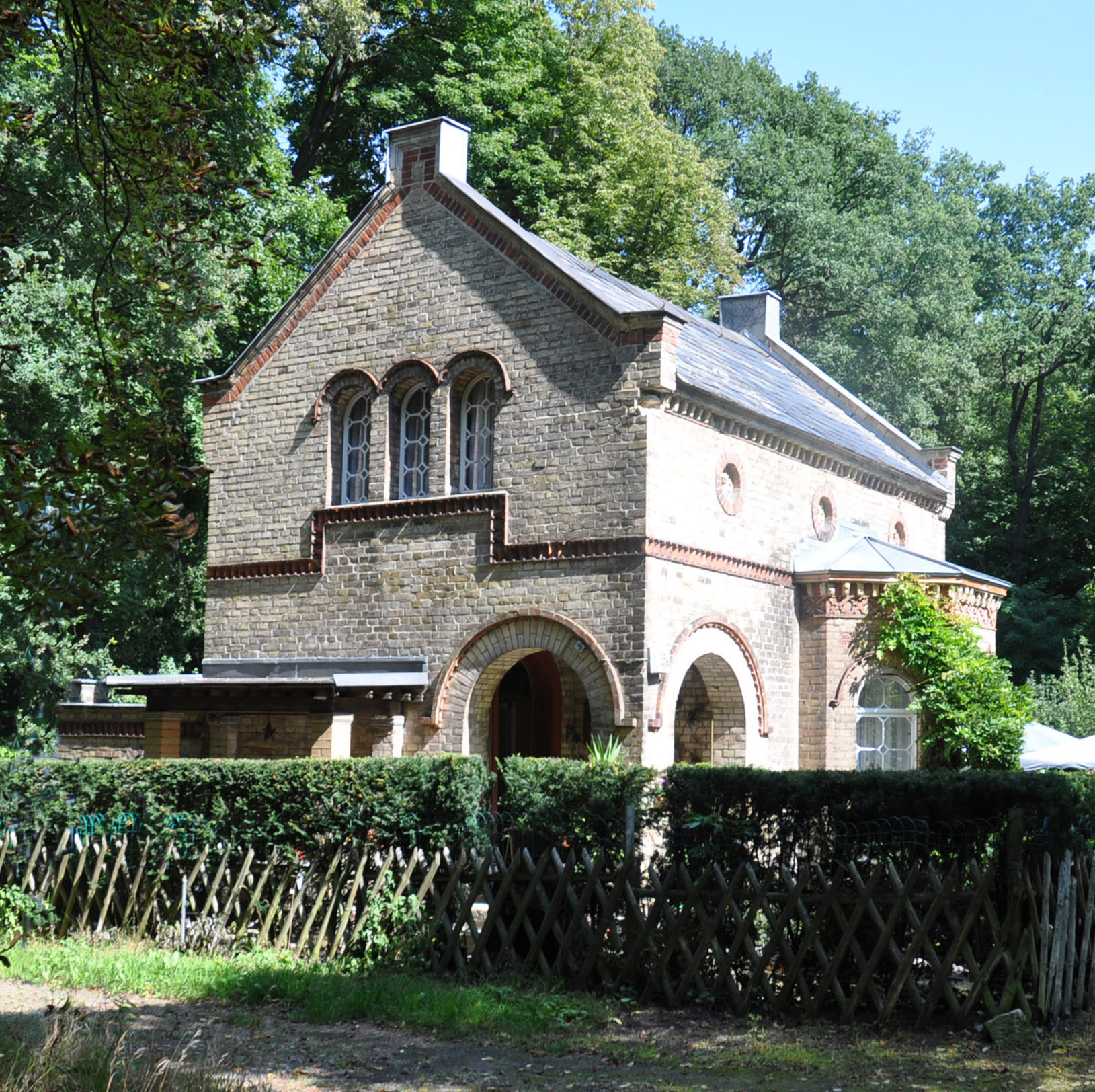 Obertor-Pförtnerhaus von Südwest